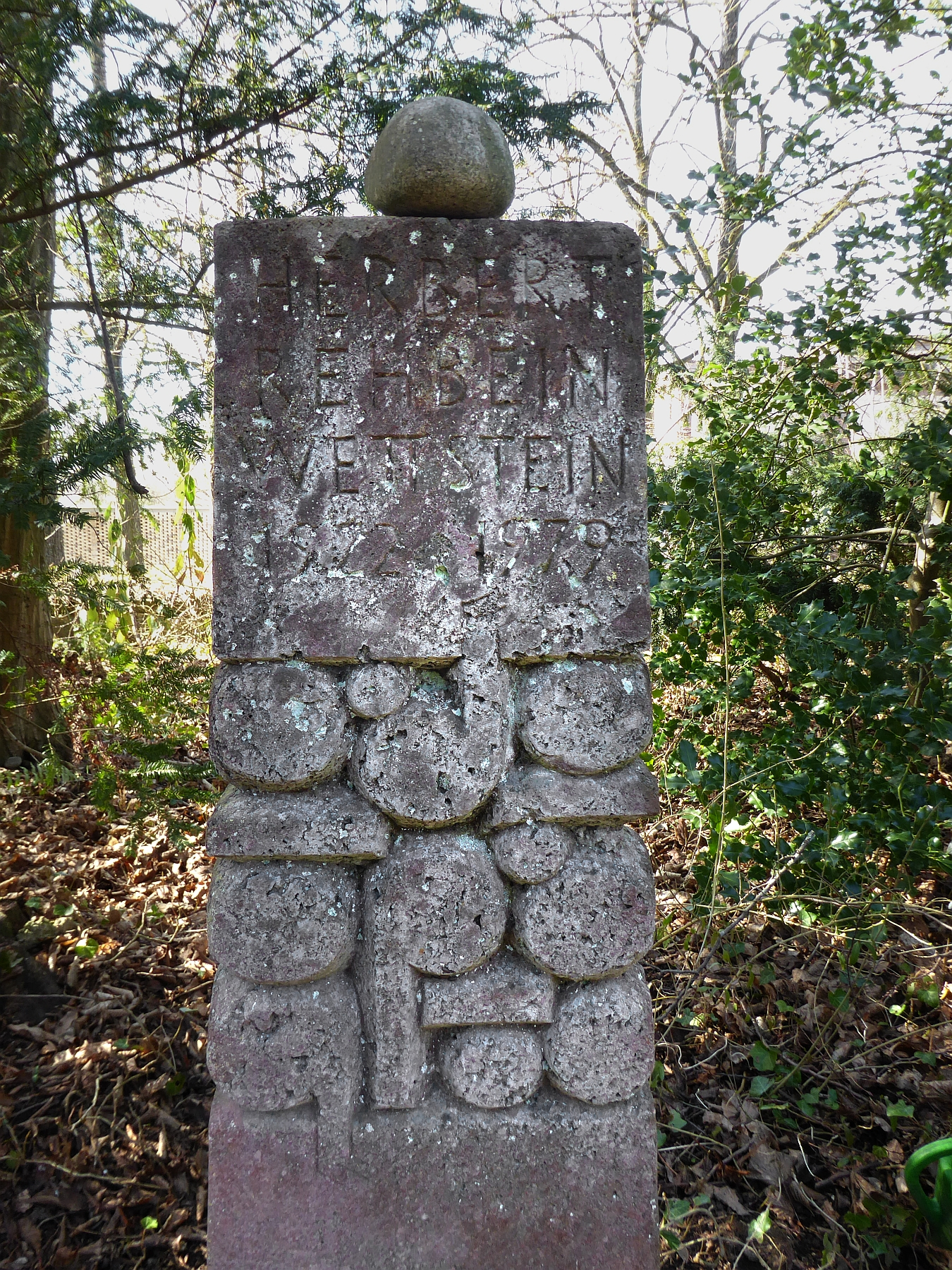 Herbert Rehbein-Wettstein (1922–1979) Musiker, Komponist, Orchesterleiter, Arrangeur, Grab auf dem Friedhof Hörnli, Riehen, Basel-Stadt